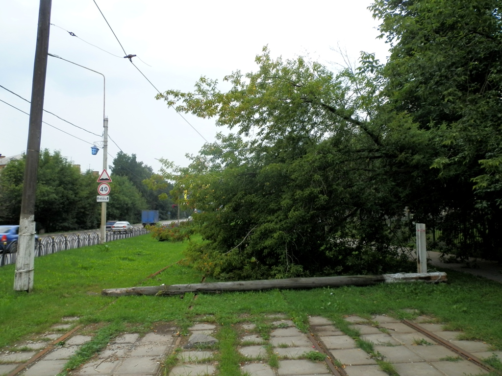 Оборванная контактная сеть и сломанная опора на разъезде "поселок Володарского"